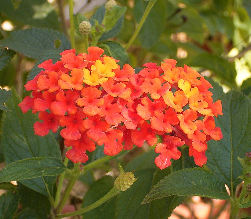 Lantana camara